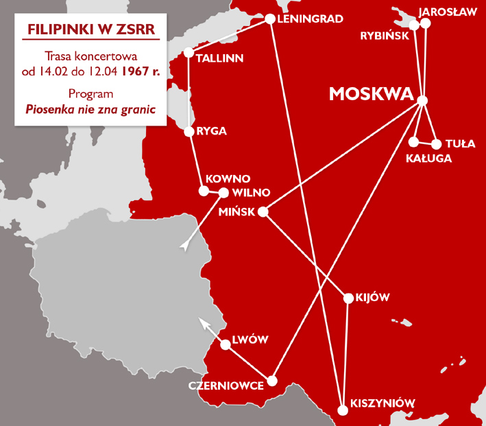 Trasa koncertowa „Piosenka nie zna granic” zespołu Filipinki i towarzyszących mu artystów w ZSRR wiosną 1967 r.